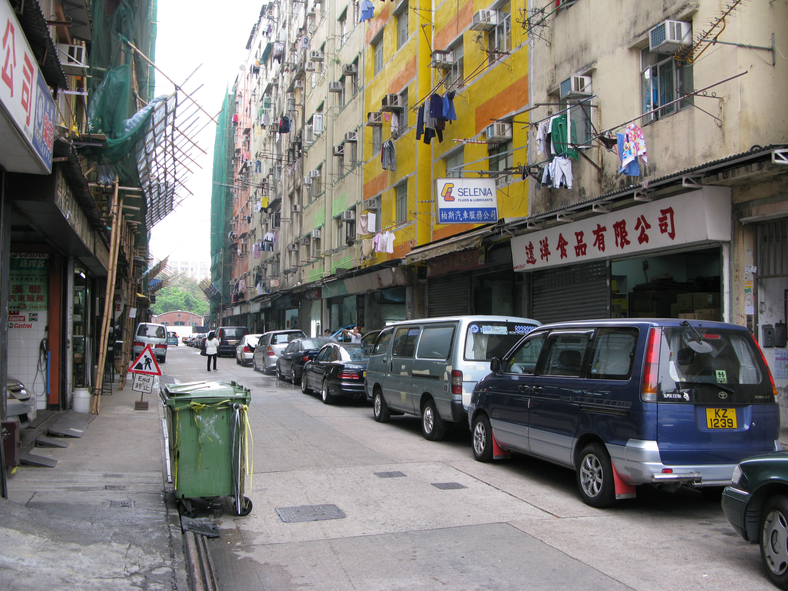 中文（香港）: 香港九龍土瓜灣十三街鵬程街街牌